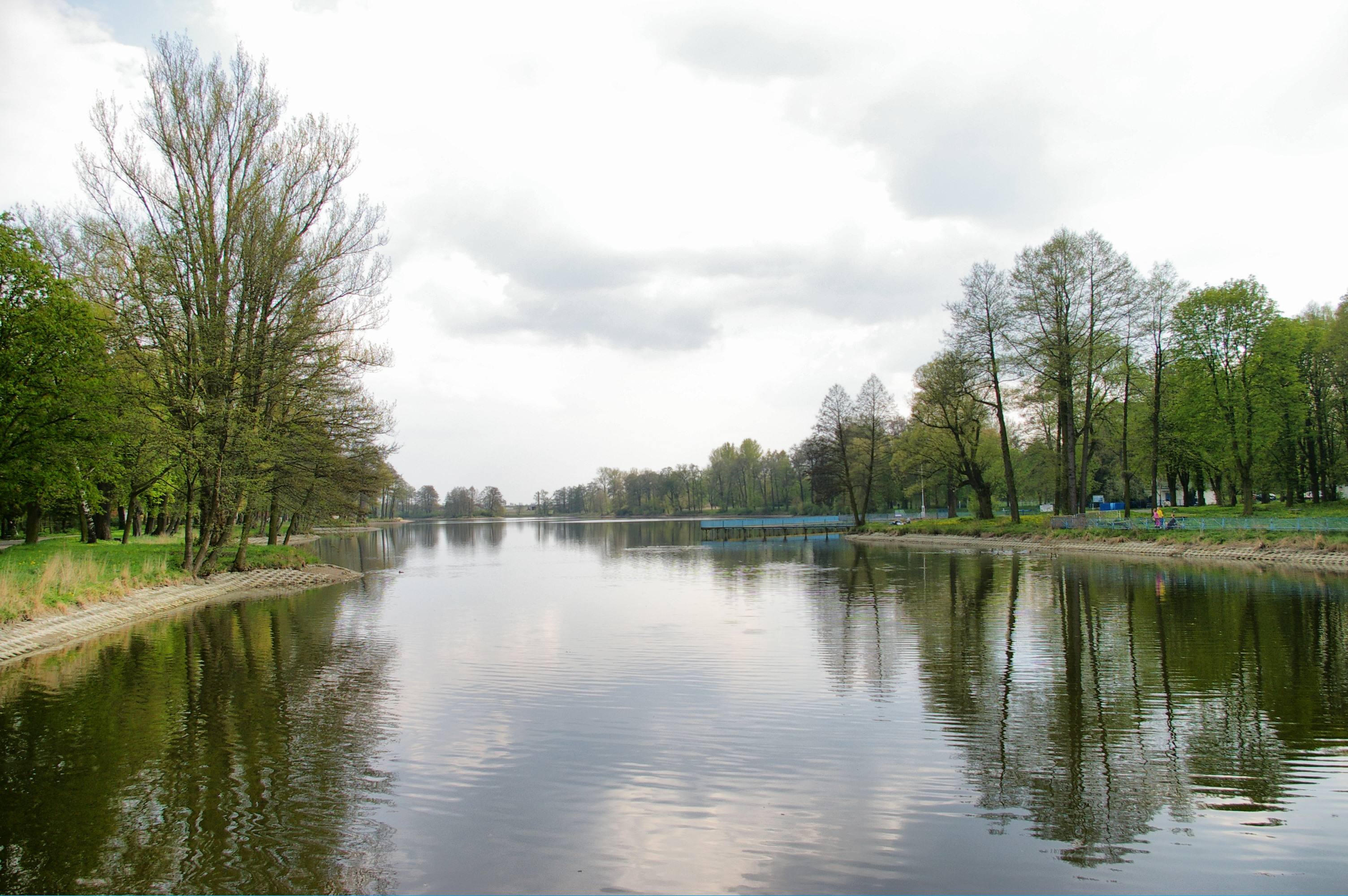 Stawy Stefańskiego, Park im. 1 Maja, Łódź